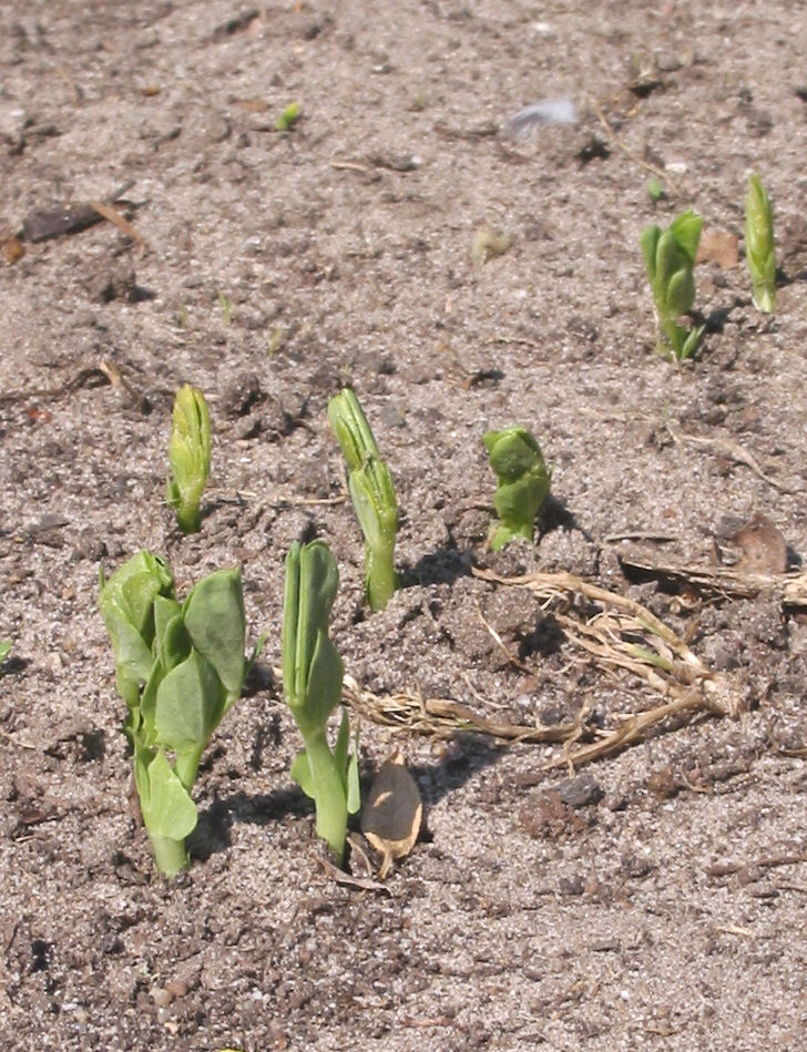 Pisum sativum emerging (Kiemplanten kreukerwten 'Kelvedon Wonder'